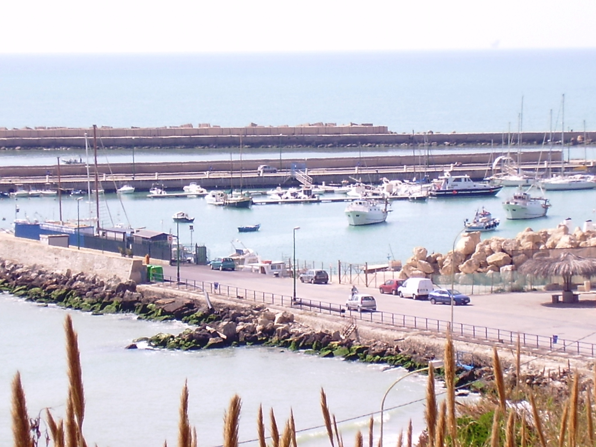 Il porticciolo turistico